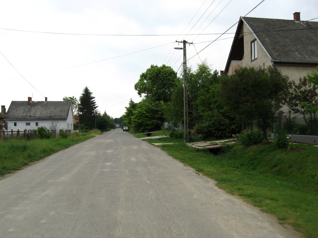 Utcarészlet Zalán (Somogy megye, Magyarország)